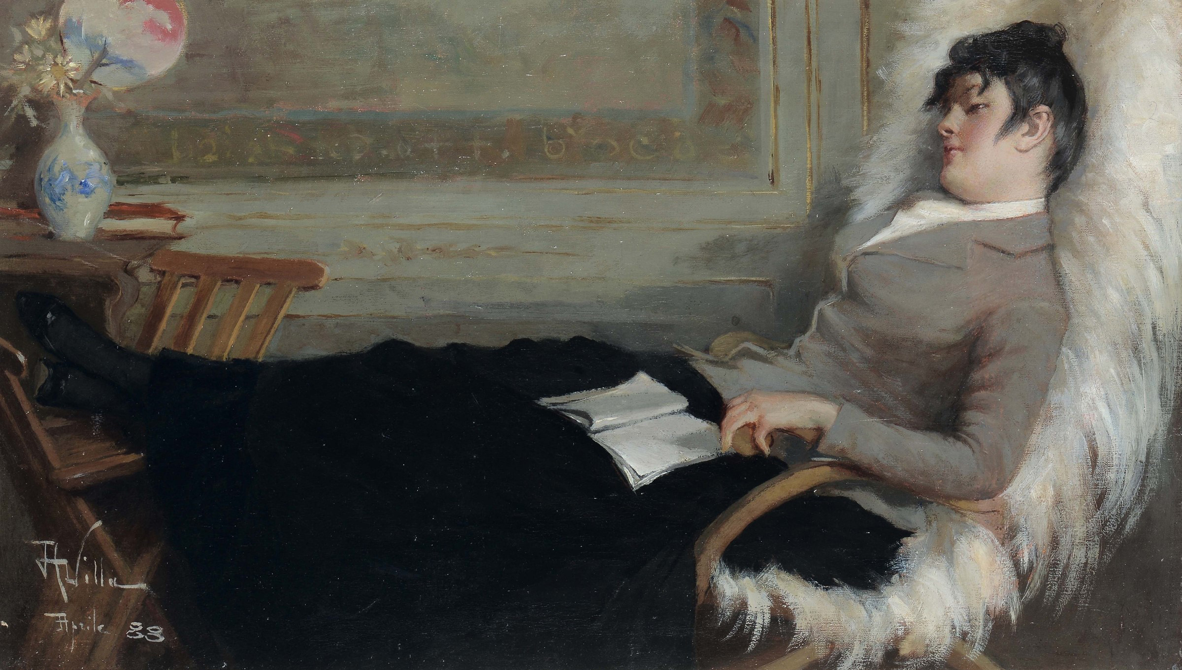 Dipinto dell'artista italiano Aleardo Villa. References for this description (or part of this) or for the depiction in the file are not provided.